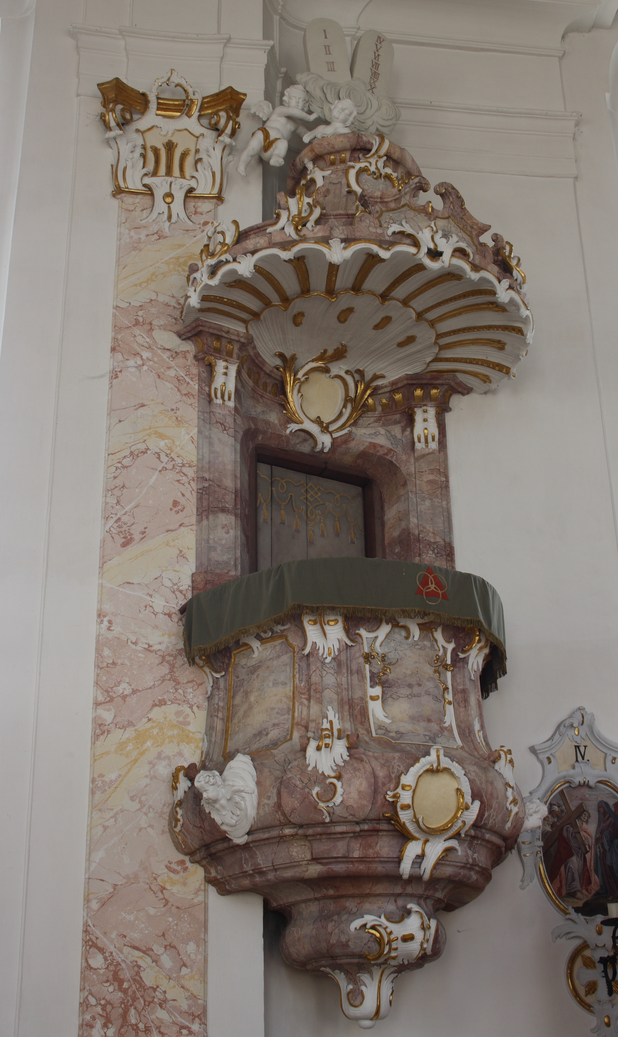 Katholische Pfarrkirche Mariä Himmelfahrt in Scheppach, einem Ortsteil von Jettingen-Scheppach im Landkreis Günzburg (Bayern), Stuckkanzel nach Entwurf von Joseph Dossenberger, von 1768/69